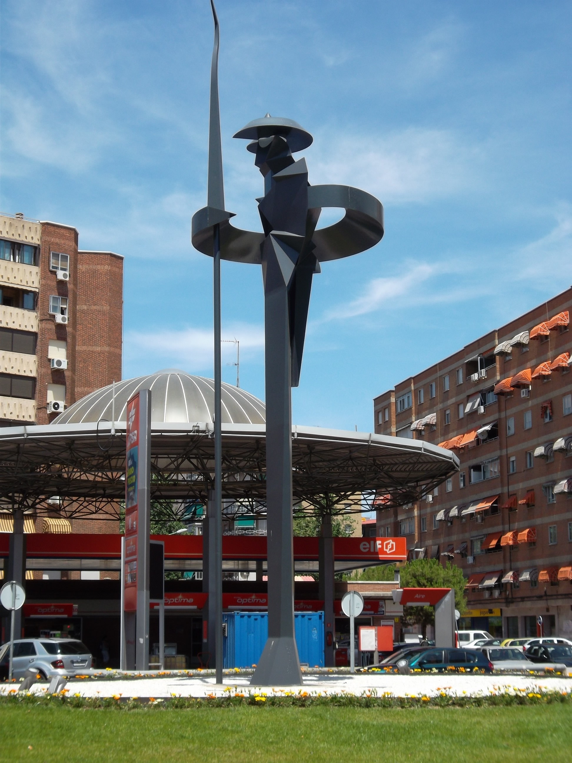 Alcala de Henares, monument érigé en 2008 en hommage à Don Quijote de La Mancha. Sculpture de Enrique Carbajal González.